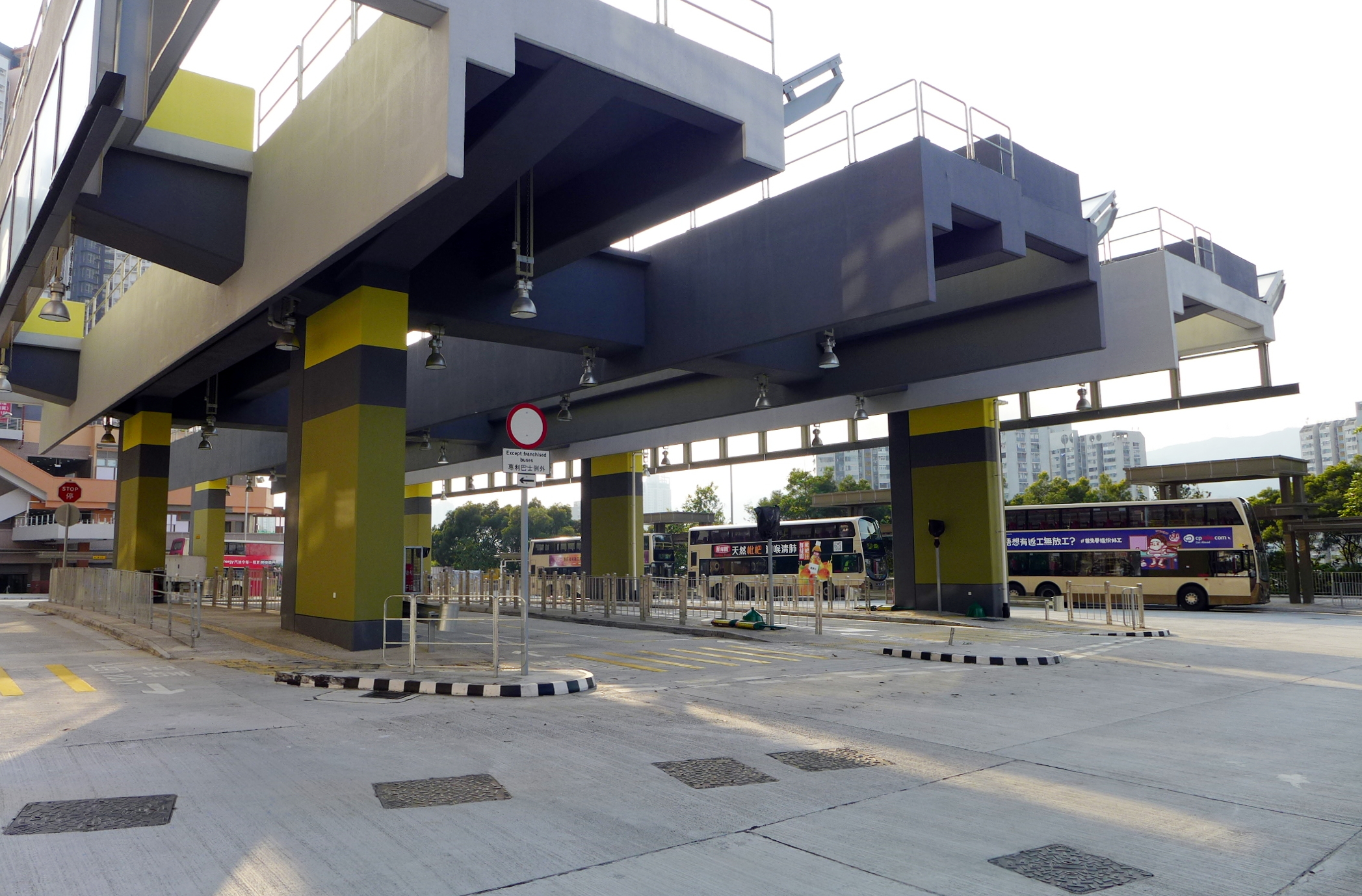 Shui Chuen O Estate Bus Terminal